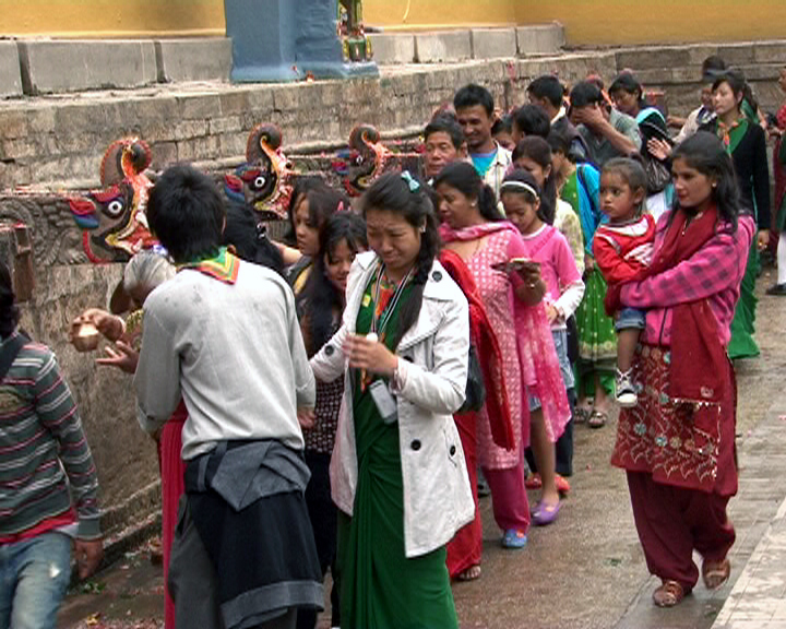 नेपाली: बालाजु बाइसधारा